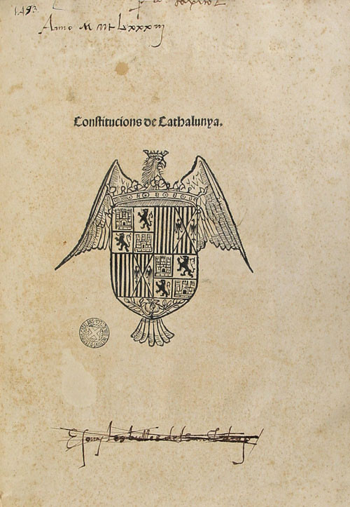 Compilació de les Constitucions de Catalunya segons resolució de les Corts de 1493 i publicada el 1494